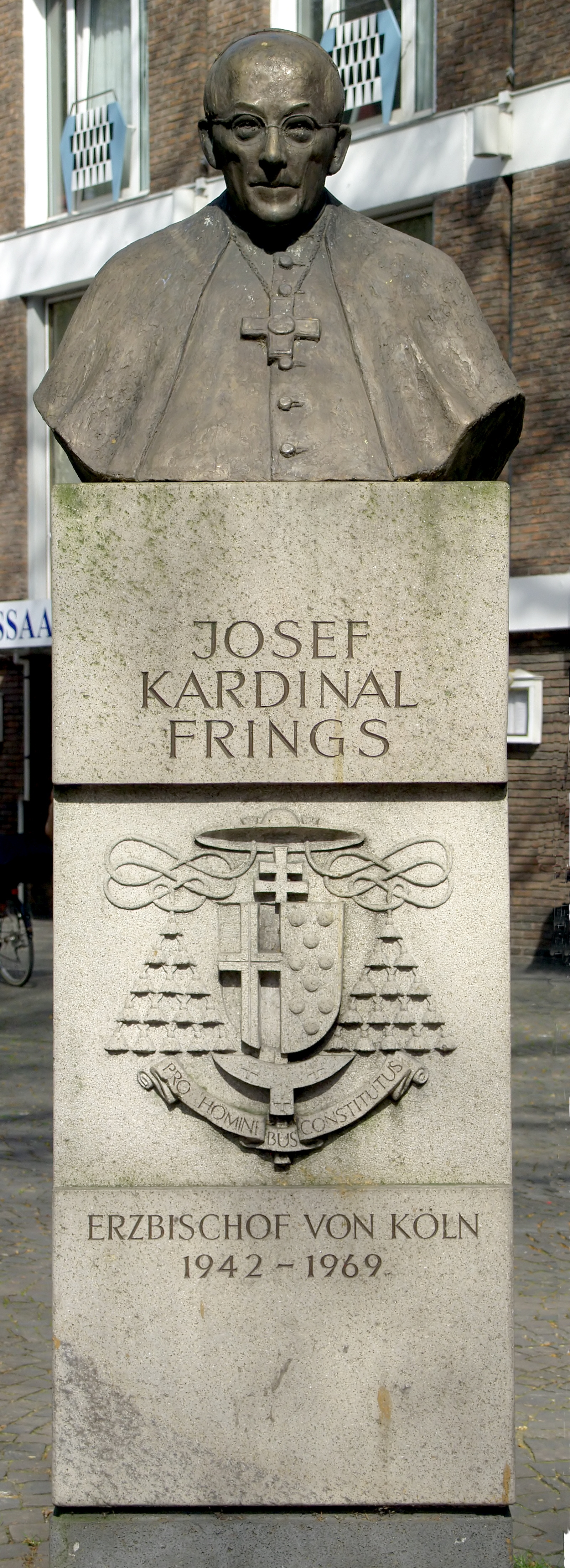 Büste von Kardinal Josef Frings auf einem Sockel mit seinem Wappen: Pro hominibus constitutus.Inschrift der Informationstafel auf der Rückseite: DENKMAL JOSEF KARDINAL FRINGS INITIIERT VON DER BÜRGERGESELLSCHAFT KÖLN VON 1863 ERMÖGLICHT DURCH HAUPTSPONSOREN BERLIN-KÖLNISCHE Versicherungen, Köln Bürgergesellschaft Köln v. 1863, Köln DOM-Brauerei, Köln DORINT HOTELS Dr. Ebertz & Partner, Köln Florack Bauunternehmung, Heinsberg Familie Dr. Günter Frerich, Köln Peter Jungen, Köln Kreissparkasse Köln Rheibraun AG, Köln RTL TELEVISION Stadtsparkasse Köln BRONZEBÜSTE GESTALTET VON KURT ARENTZ LEVERKUSEN Inschrift am Sockelfuß (Rückseite): 1998 KARTZ RIDDER